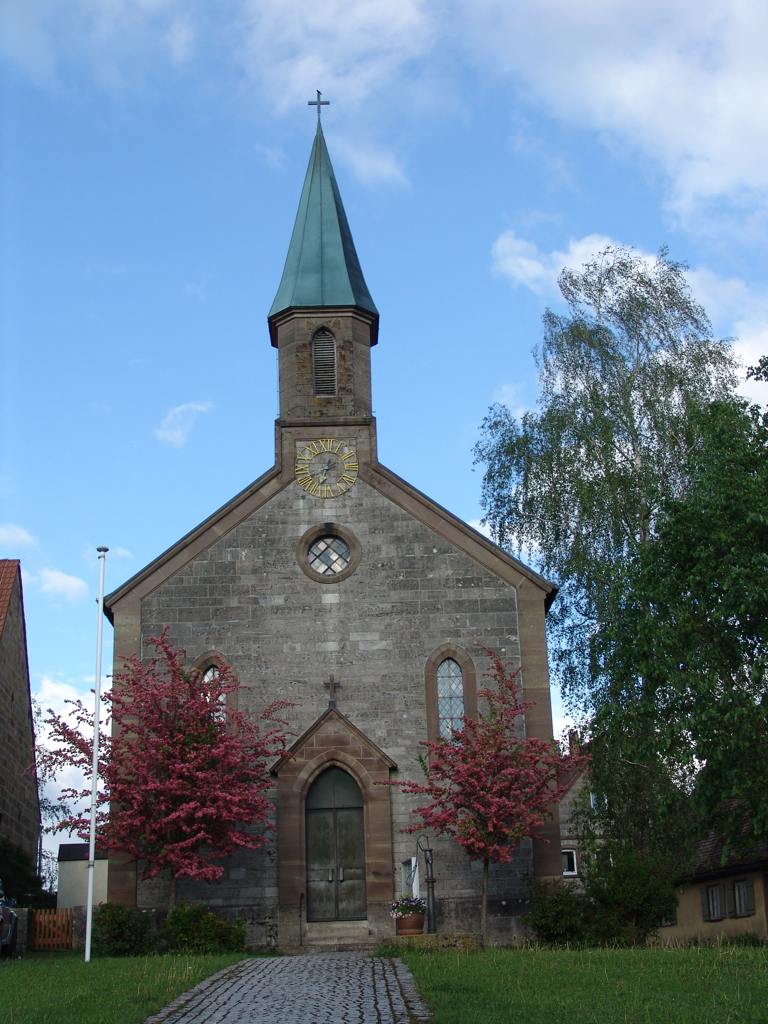 evang-luth. Kirche in Großharbach